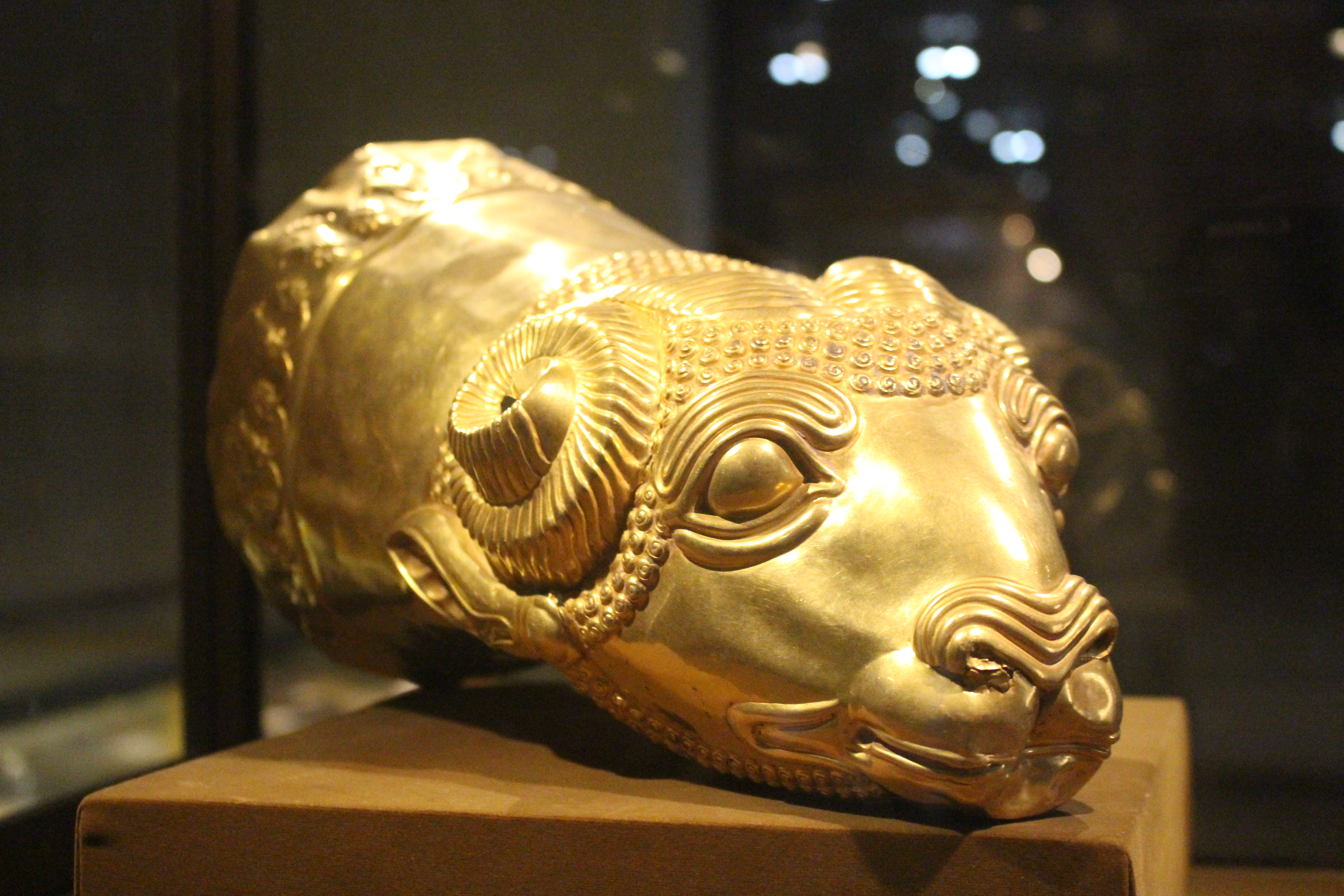 موزه رضا عباسی Reza Abbasi Museum